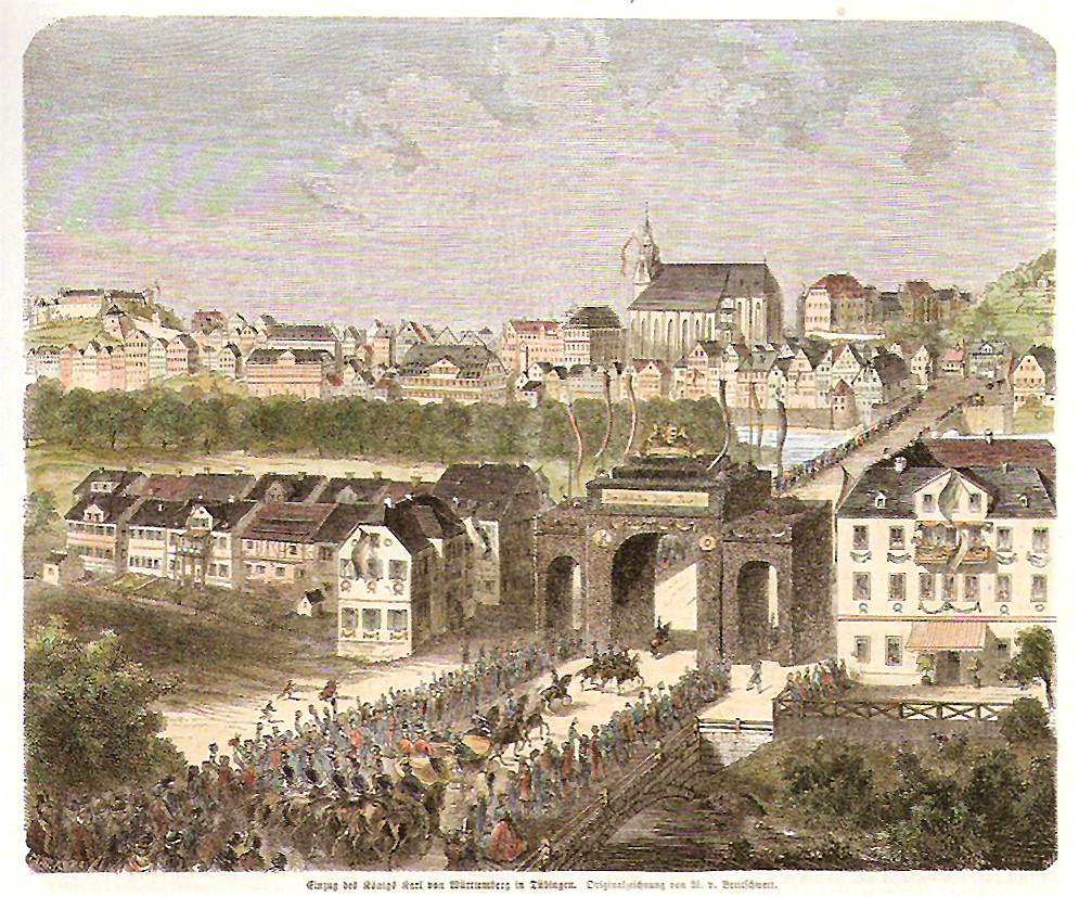 Einzug des Königs Karl von Württemberg in Tübingen am 1. Juni 1865. Da der König mit dem Zug ankam, wurde das Begrüßungstor in der Neckarvorstadt direkt vor der Eberhardsbrücke in der damals namenlosen Straße aufgestellt, die später zur Ehre des Königs den Namen Karlstraße erhielt (kolorierter Holzschnitt; das Atelier von Hornung & Sinner als Pavillon in der oberen Wöhrdstraße (heute Uhlandstraße) ganz links am Bildrand). Kolorierter Holzschnitt nach der Zeichnung von Wilhelm von Breitschwert aus „Allgemeine Illustrierte Zeitung“ 1865, Blatt 21,1 × 27,6 cm